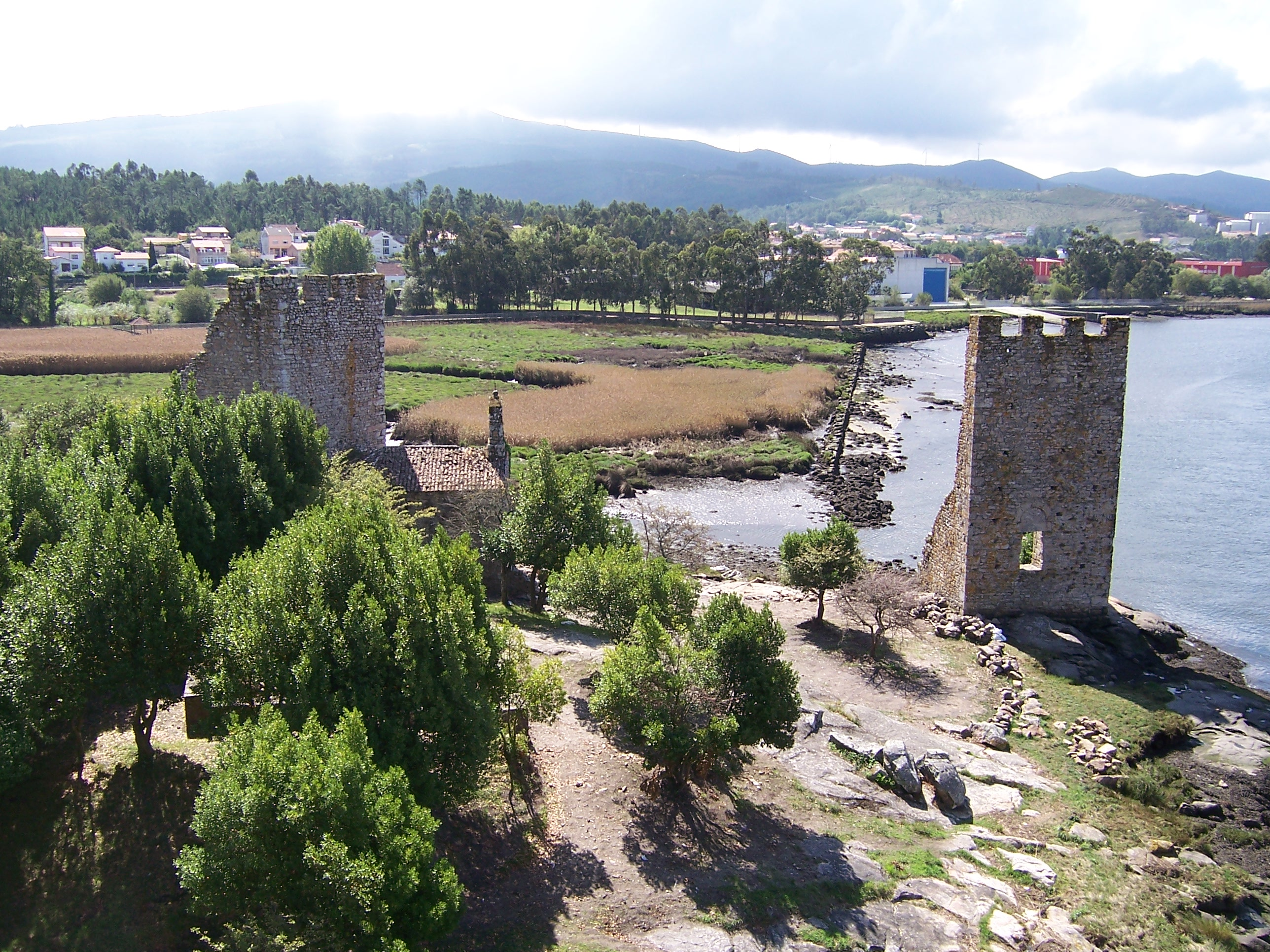 Vista panoramica as Torres de Catoira